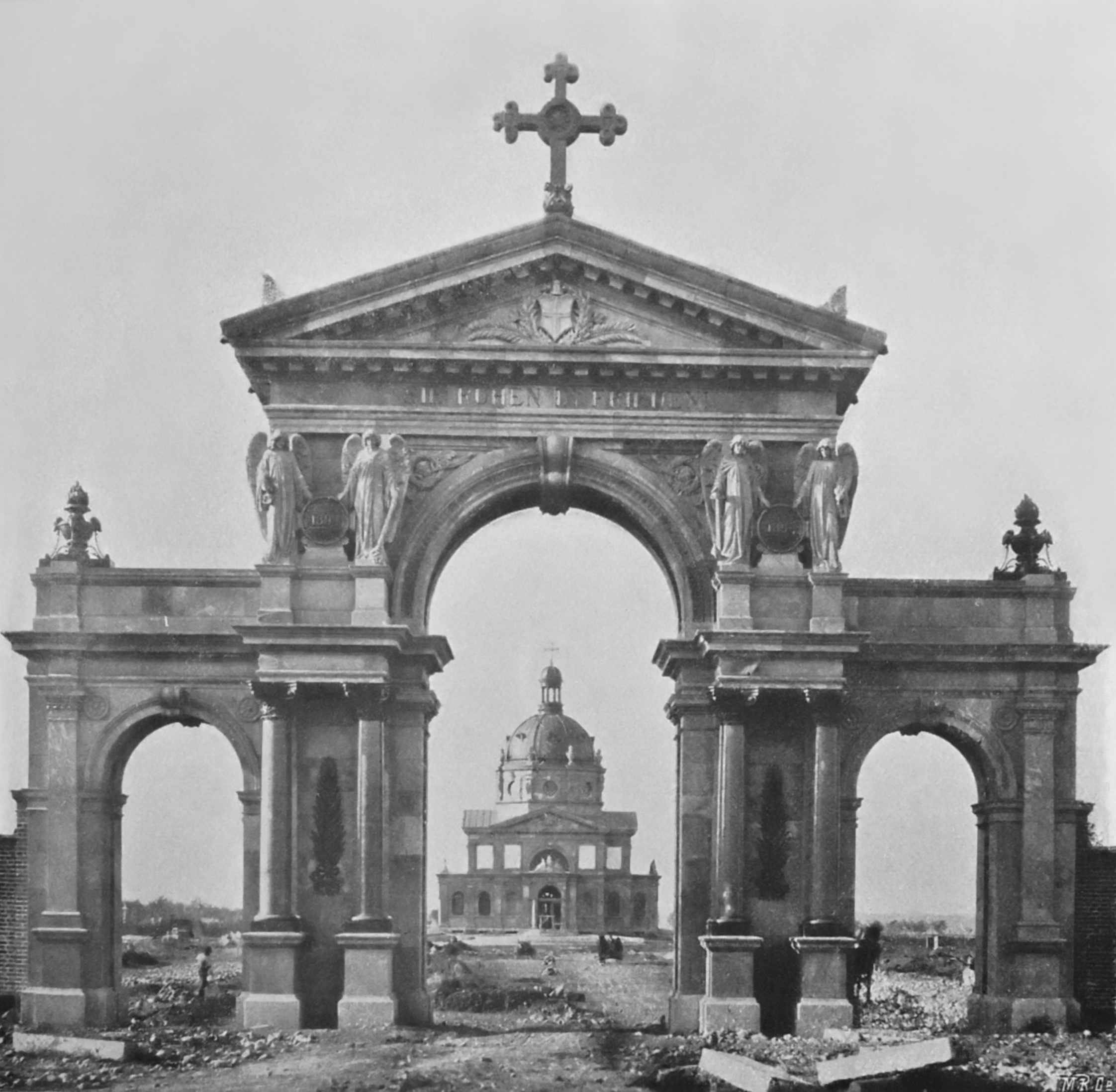 Freiburg im Breisgau. Die Stadt und ihre Bauten.